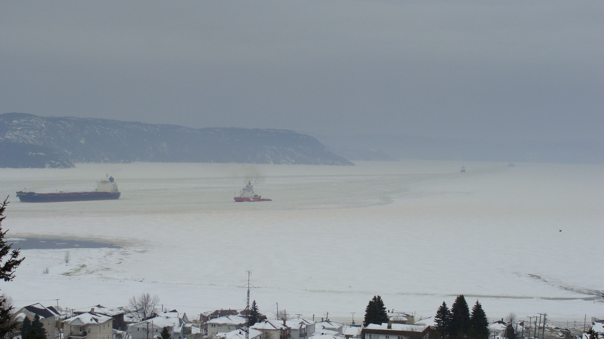 Bateaux à La Baie, au Saguenay (Québec, Canada). Le NGCC Terry Fox ..IMO 8127799